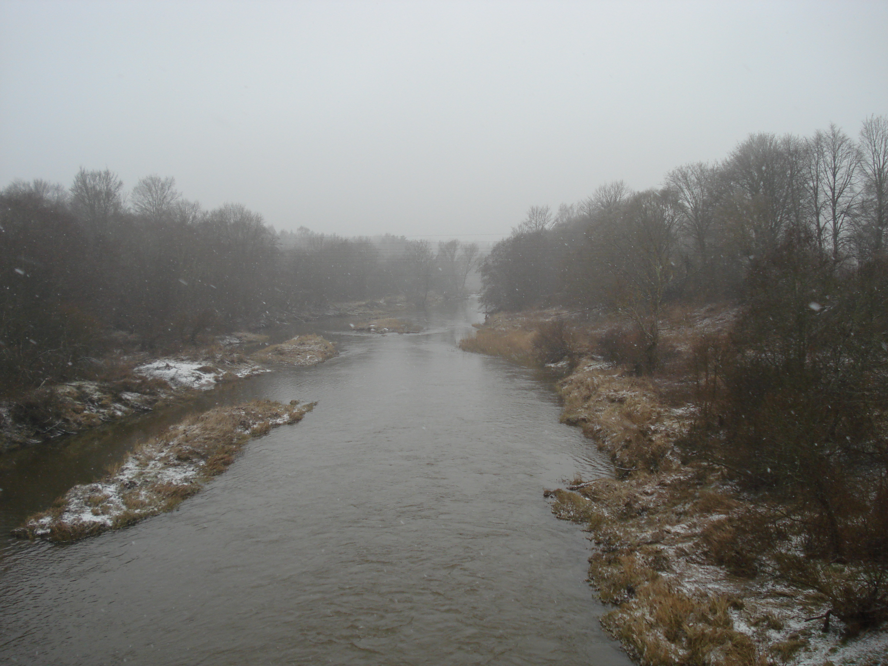 Barta River